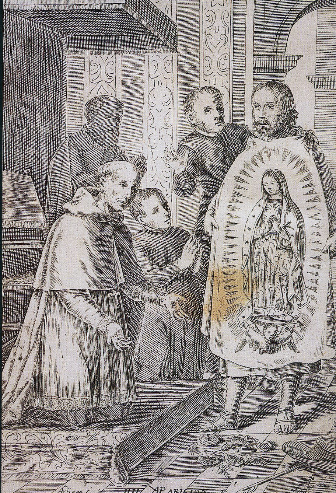 Gravure publiée dans l'ouvrage "Felicidad de México" en 1666 et 1669 (Espagne) représentant Juan Diego lors de l'apparition de la Vierge de Guadalupe